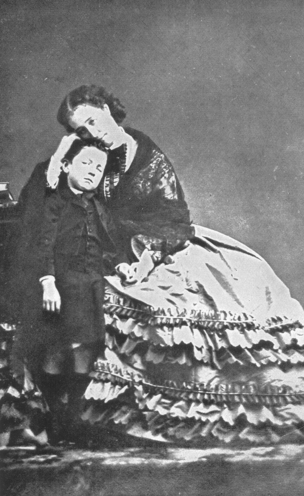 Cesarzowa Eugenia z synem, ok. 1858